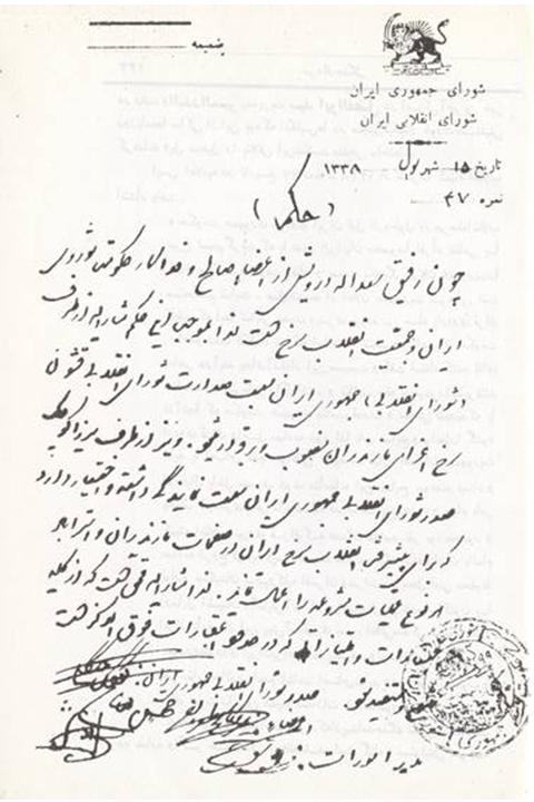 "Camarade Saadollah Darvish" est nommé Président du conseil révolutionnaire (Commissaire) des forces de la province de Mazandaran. La lettre est signée de Mirza Koochak Khan (sa signature usuelle est Kouchak-e Jangali c.à.d "Kouchak de la Jungle") et d'autres membres du "Conseil Révolutionnaire de la république d'Iran", 1920.